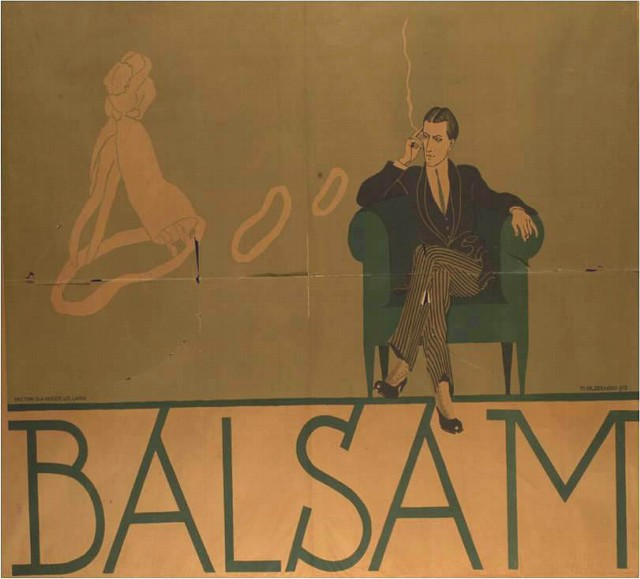 Marian Kazimierz Olszewski, „Balsam”, plakat reklamowy 65×85 cm,litografia barwna, papier, Drukarnia Piller-Neumann, ze zbiorów Muzeum Etnografii i Przemysłu Artystycznego we Lwowie